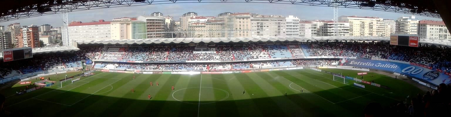 Vigo-Estadio de Balaídos